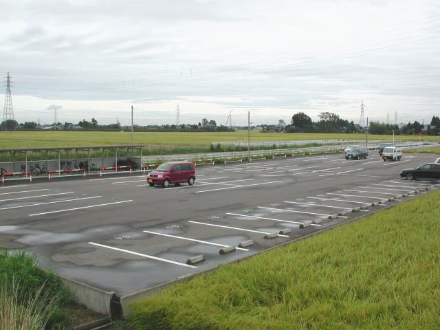 JR新関駅東口駐車場